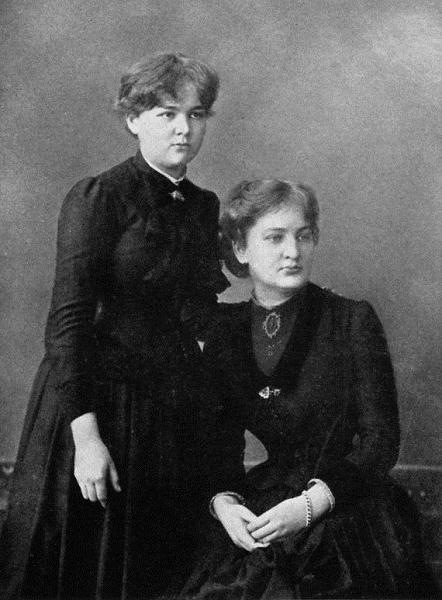 Le départ à Paris souhaité par Maria a un coût important, que le père de Maria ne peut pas assumer seul, d’autant que Bronislawa veut elle aussi partir faire ses études à Paris, à la Faculté de médecine. Les deux sœurs font un pacte : Maria s’engage comme gouvernante et économise de l’argent pour financer les études de sa sœur en France. En contrepartie, une fois Bronislawa devenue médecin, elle paiera les études de sa cadette.